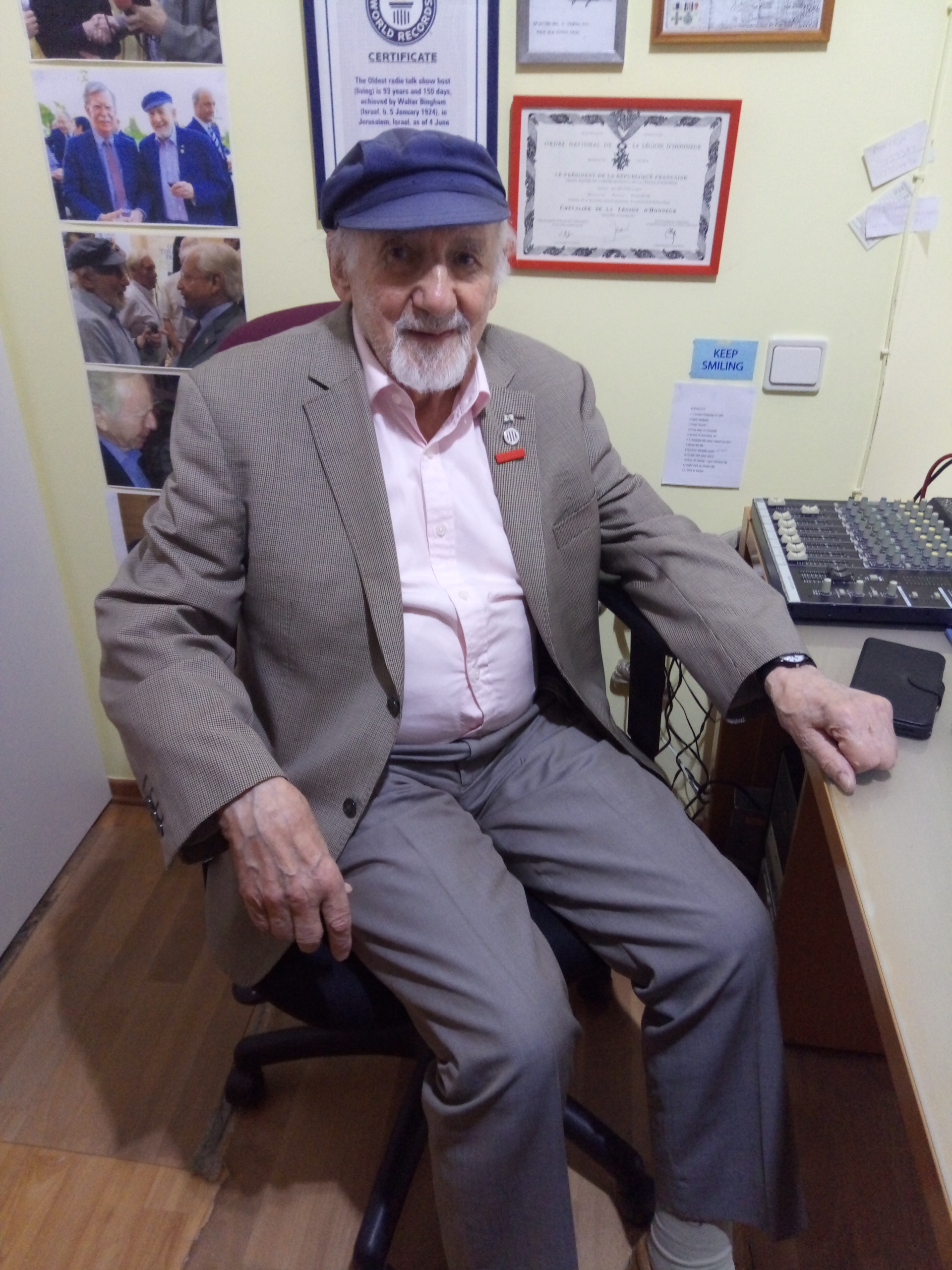 וולטר בינגהם בחדר עבודתו